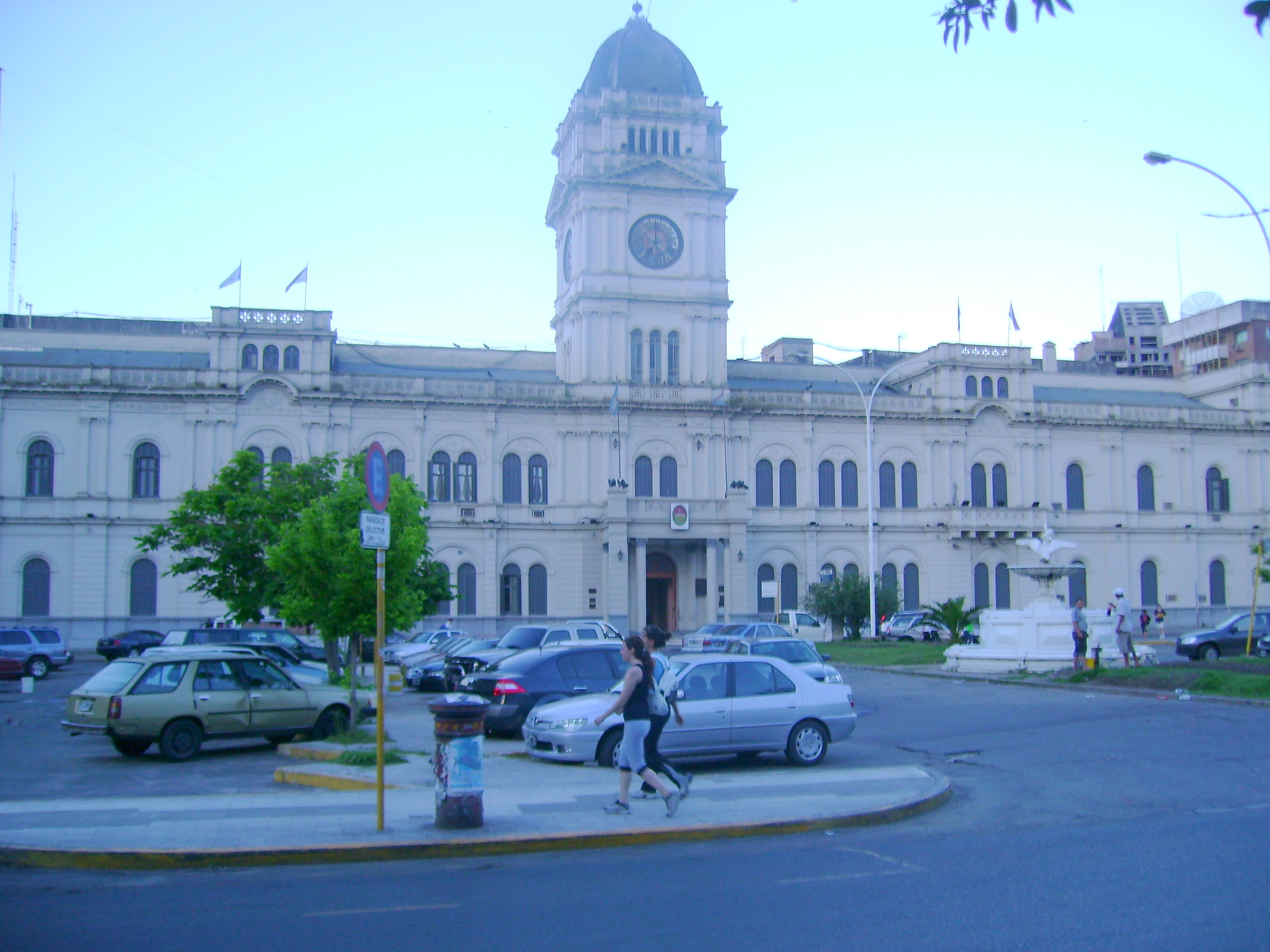 Casa de Gobierno de la Provincia de Entre Ríos, sita en Paraná.